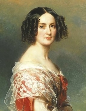 Emilie de Pellapra, Princesse de Chimay (1808-71, fmr Comtesse de Brigode)